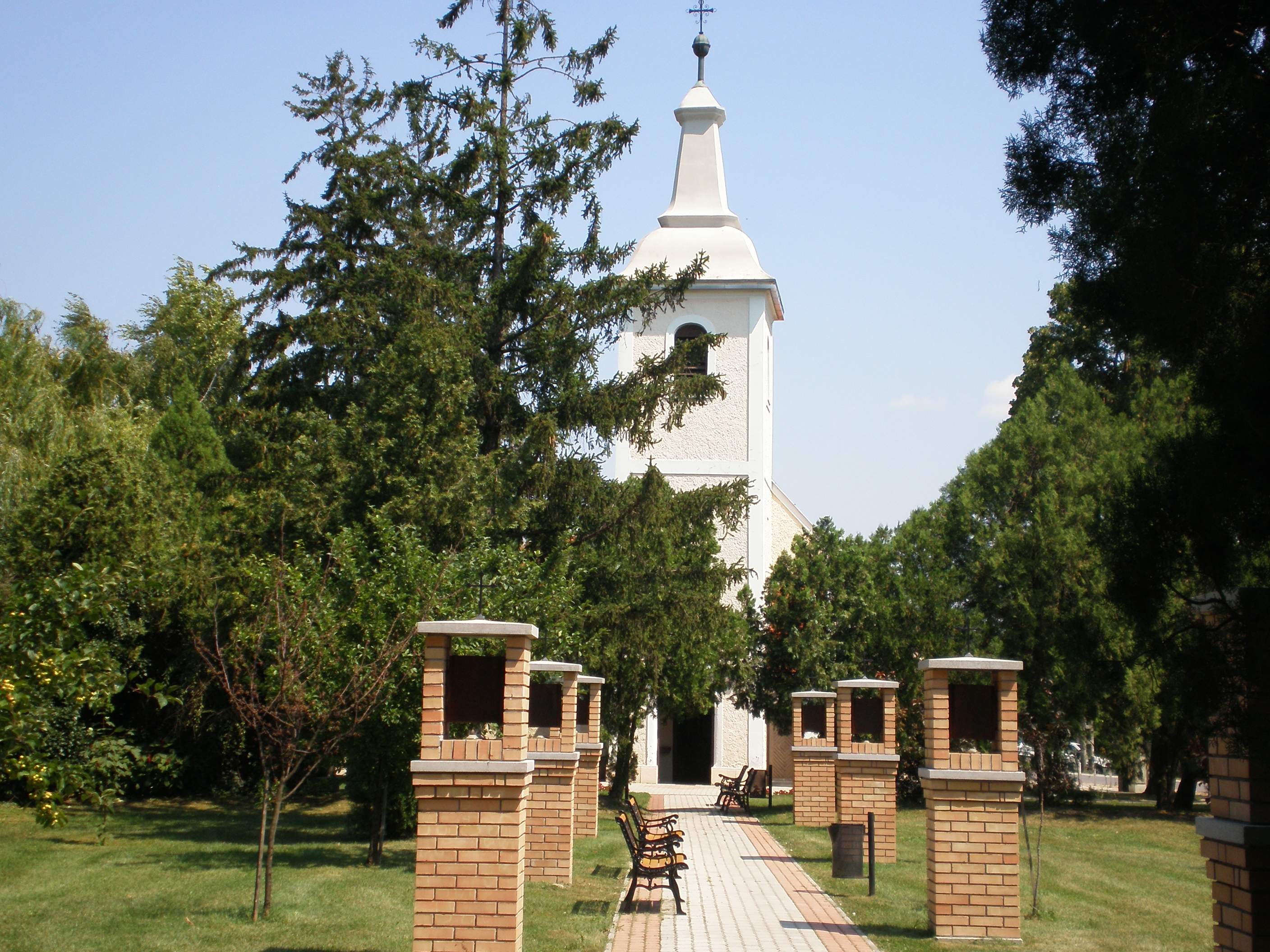 Római katolikus templom (Dunaszeg, Győr-Moson-Sopron megye, Magyarország)